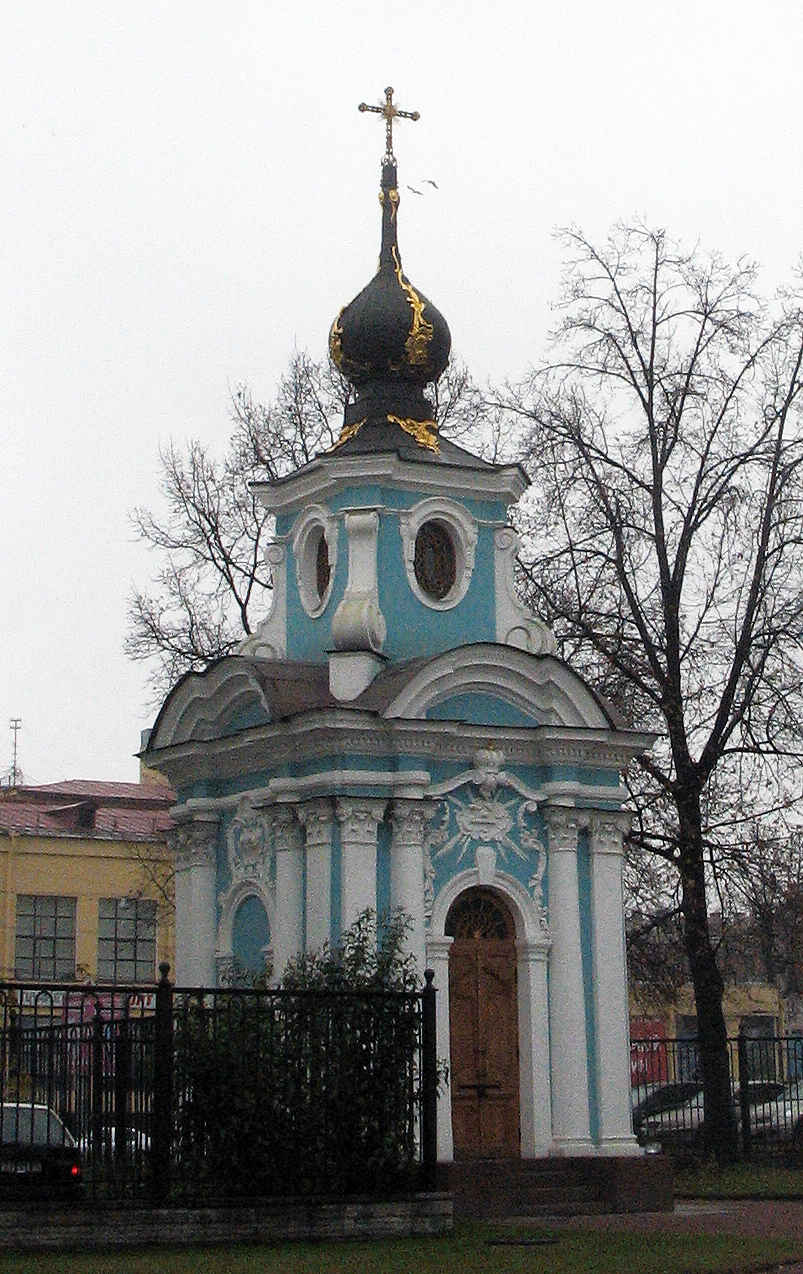 Часовня построена в 1909 году в совсем нехарактерном для того времени архитектурном стиле елизаветинского барокко по образцу Ф. Б. Растрелли, который заметно отличается от собора и колокольни, архитектор — А. П. Аплаксин. Пары колонн на углах, скруглённый фронтон с расположенной под ним художественной композицией «Всевидящее Око Господне», овальная люкарна и луковичный купол на фонаре придают зданию облик XVIII века. Фотография сделана на территории самого собора. За часовней проходит Большой Сампсониевский проспект.